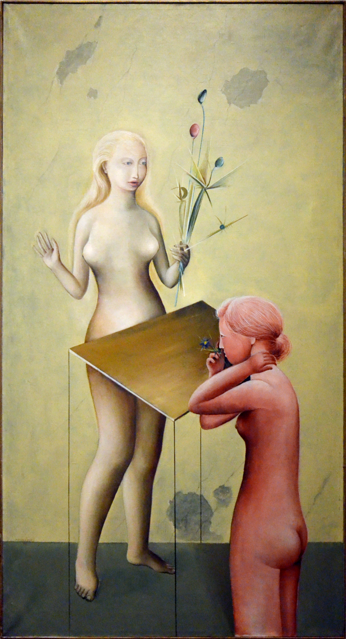 Stanislav Podhrázský, Dívky u stolu (1956), olej, Galerie moderního umění v Hradci Králové